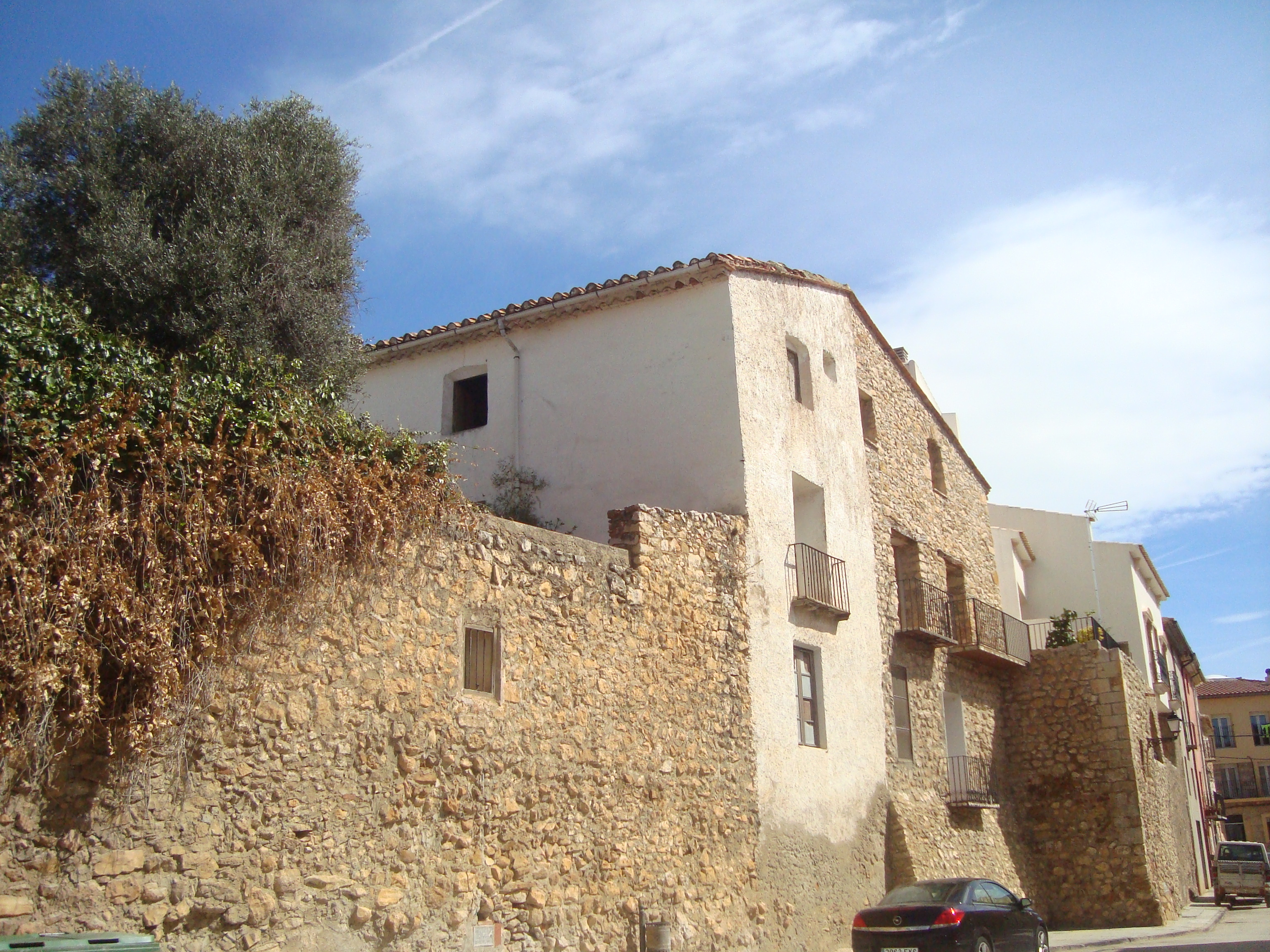 Muralles de Vilanova d'Alcolea 05.132-033.